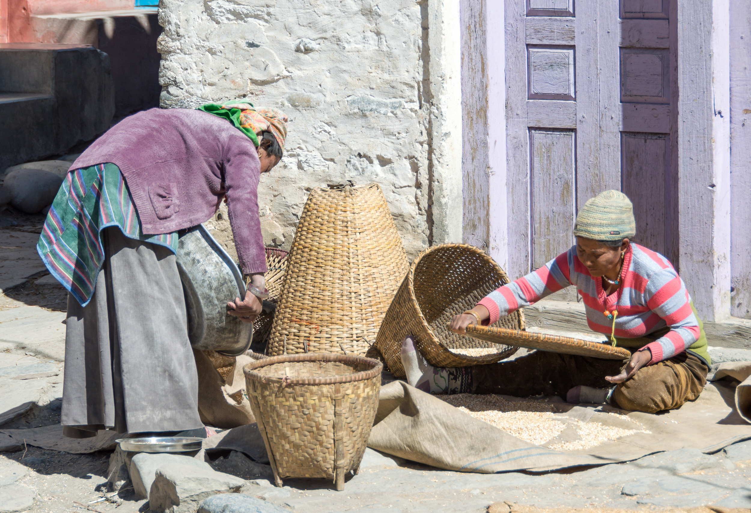 Women bolting grain / Kagbeni, Nepal